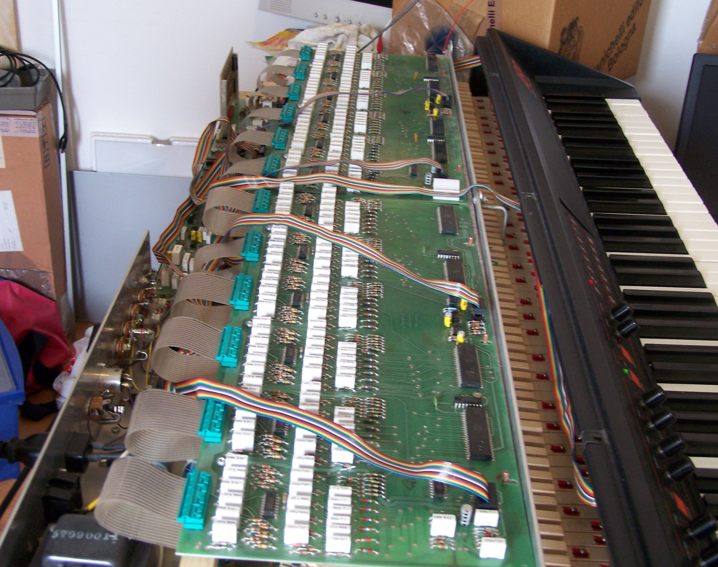 Elettroniche